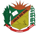 Brasão de armas do município de Vale do Sol